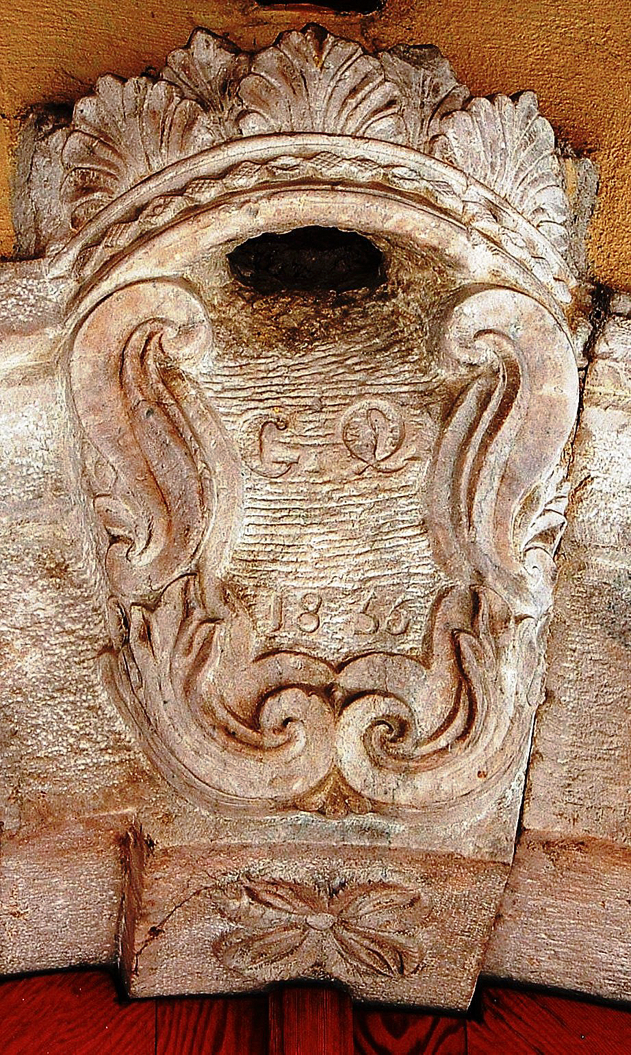 Chiave di volta, ornamento posto sul portale. Ogni chiave di volta raffigurava il lavoro che si faceva o il ceto sociale della famiglia .